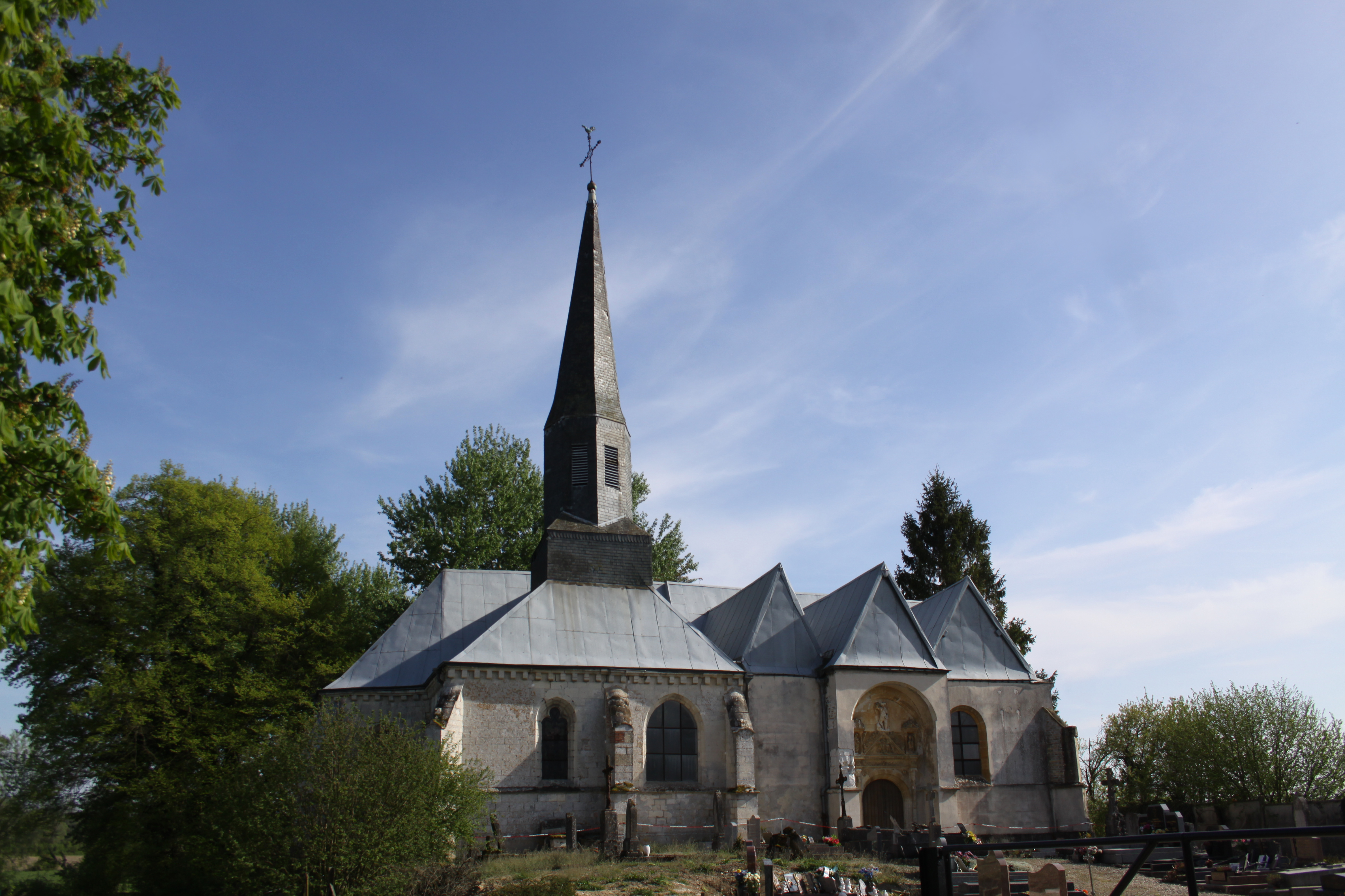 Église Saint-Martin de Doux (Ardennes, France) .